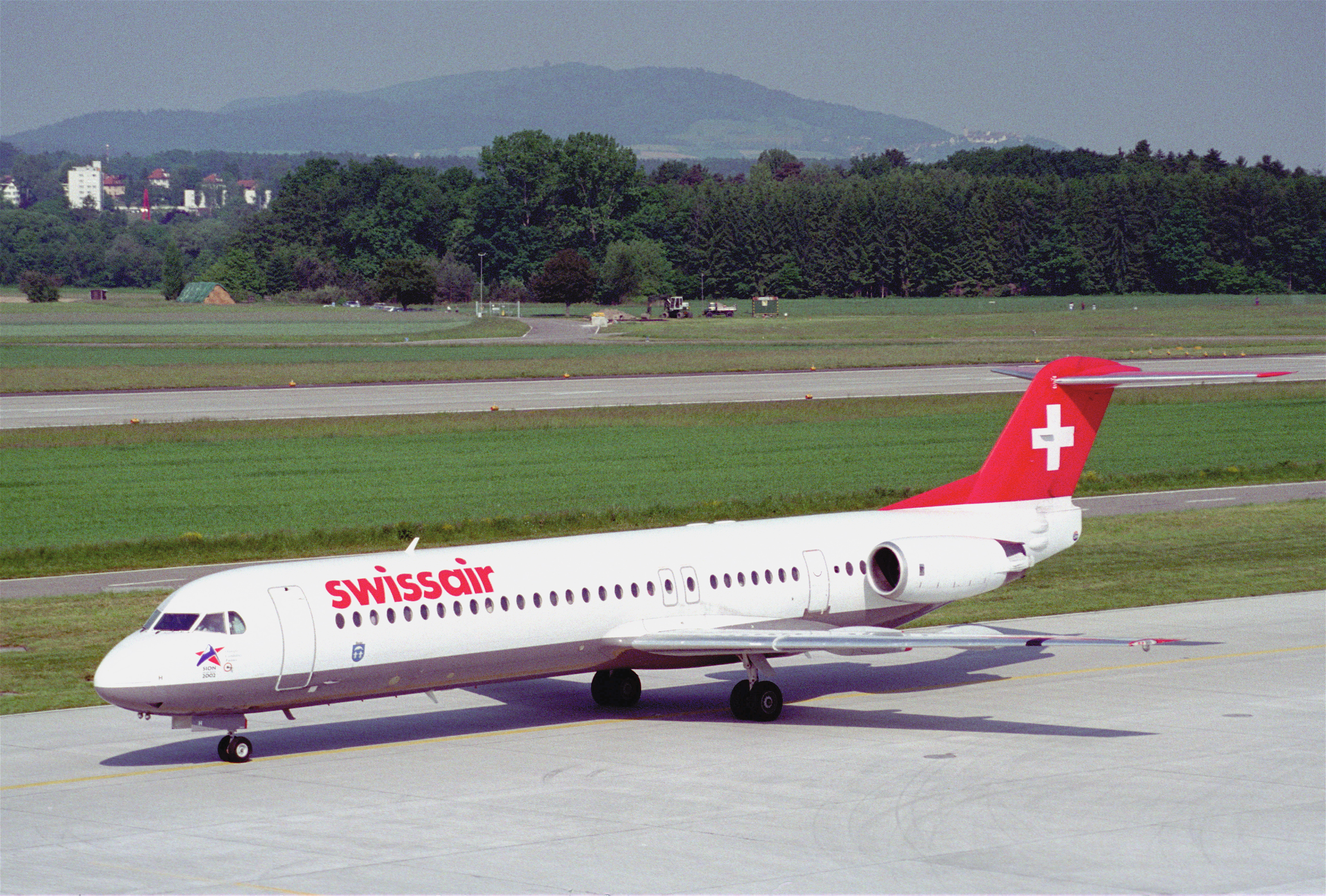 Swissair Fokker 100; HB-IVH@ZRH;25.05.1995